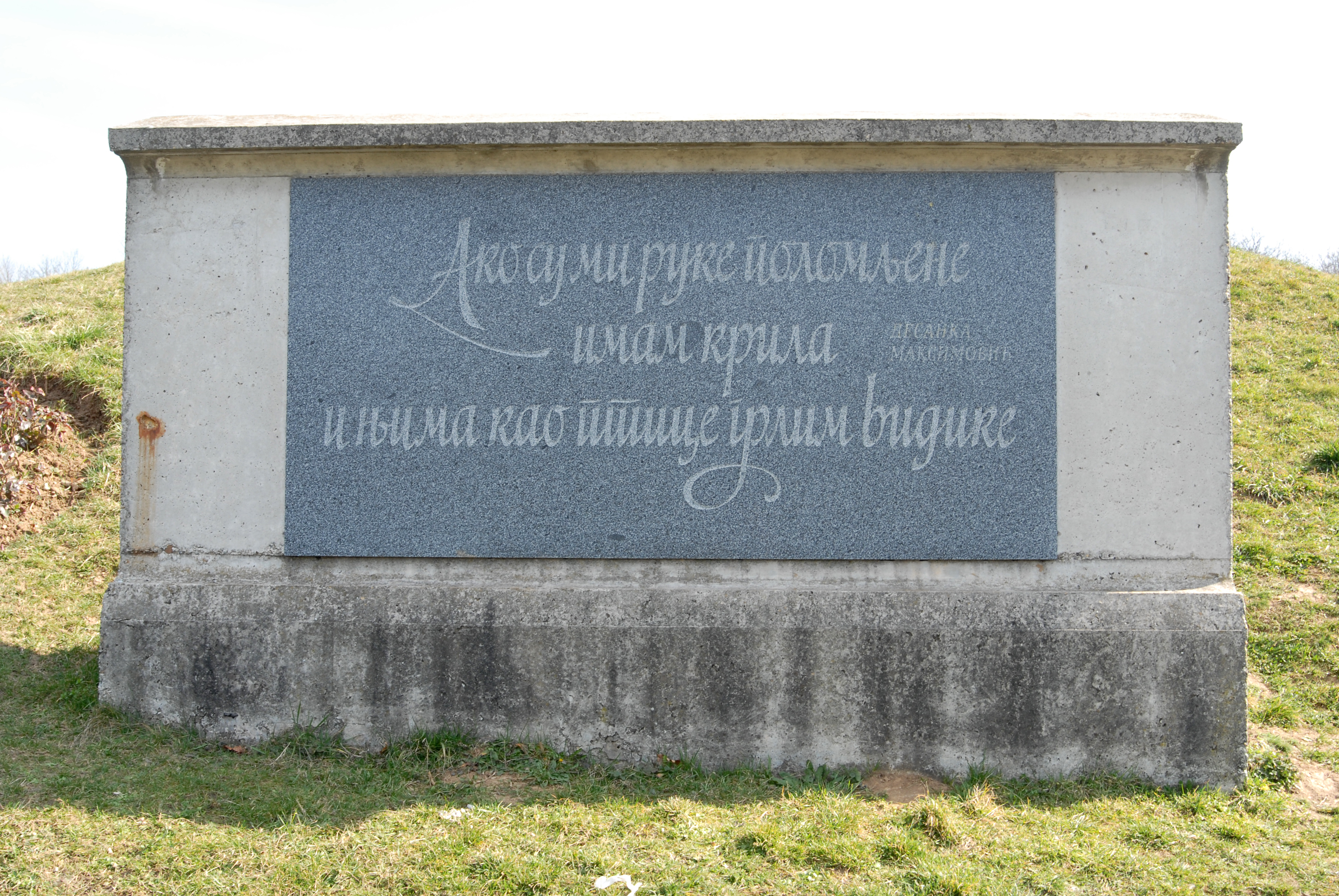 Српски (ћирилица): Спомен парк Јајинци